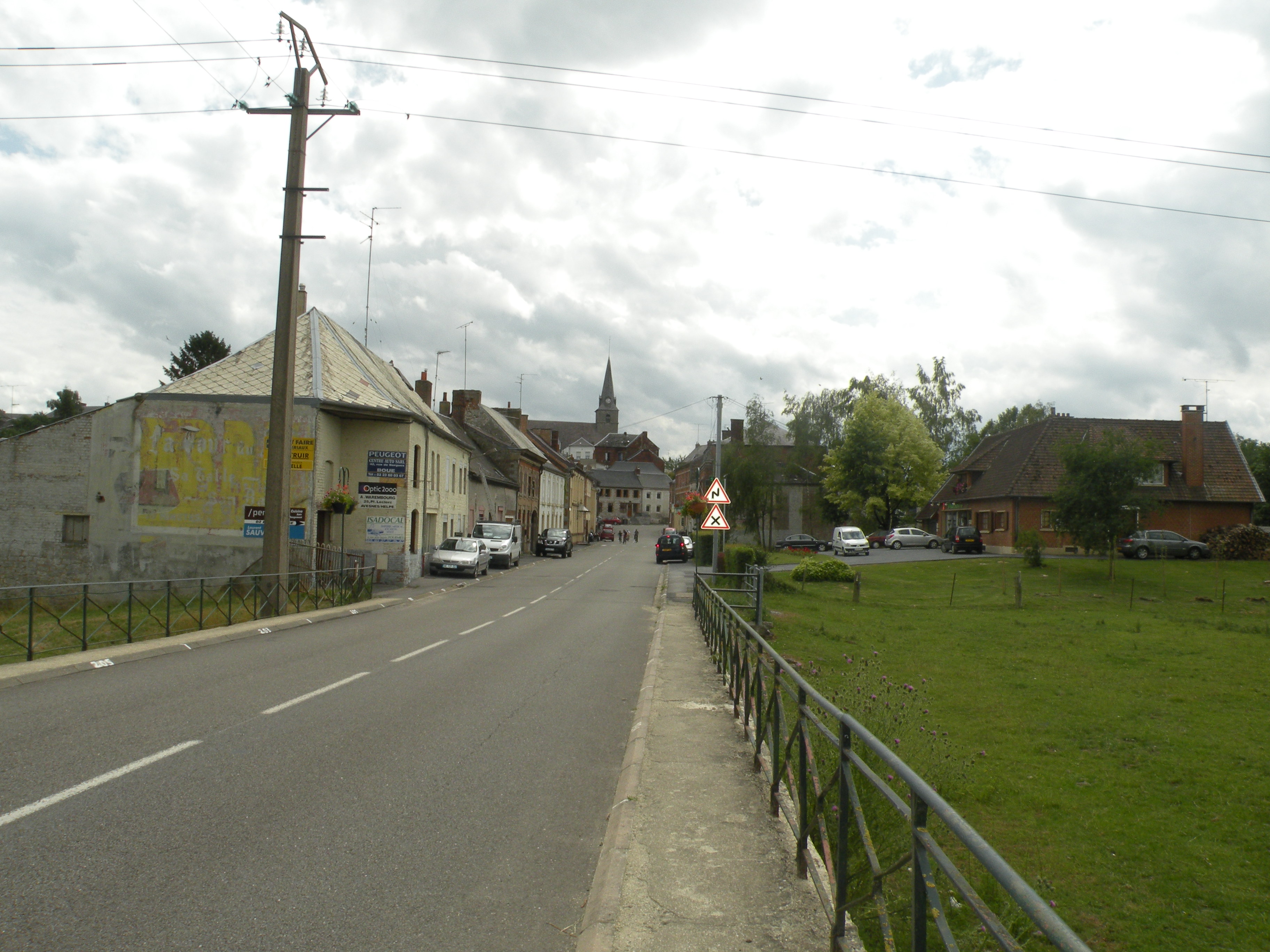 rue d' Étrœungt